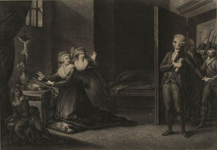 Madame Anne Elisabeth, sœur du roi Louis XVI, condamnée au supplice le 10 mai 1794. (musée de la Révolution française)